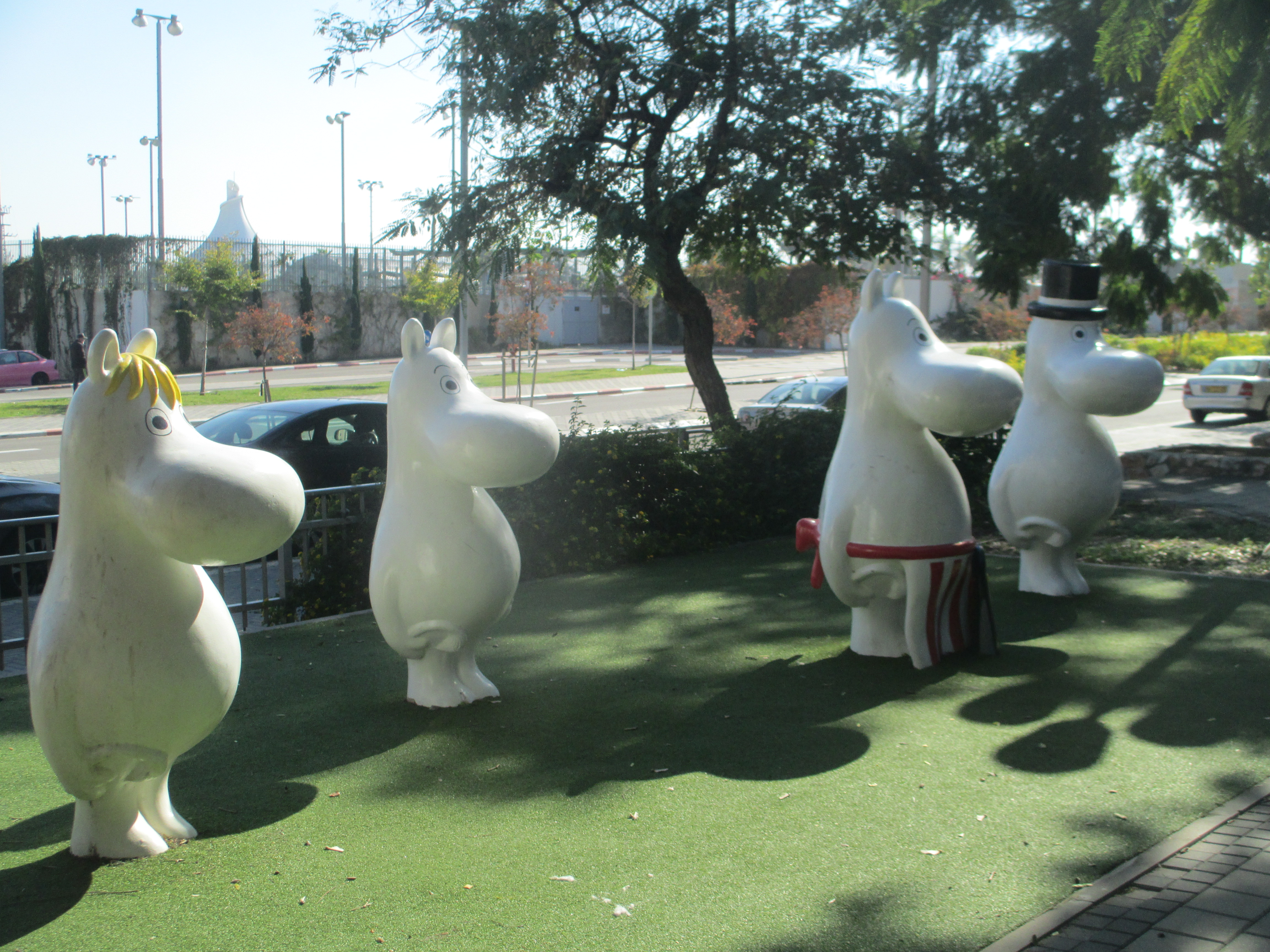 גן המומינים ברחוב מפרץ שלמה פינת שרת בחולון